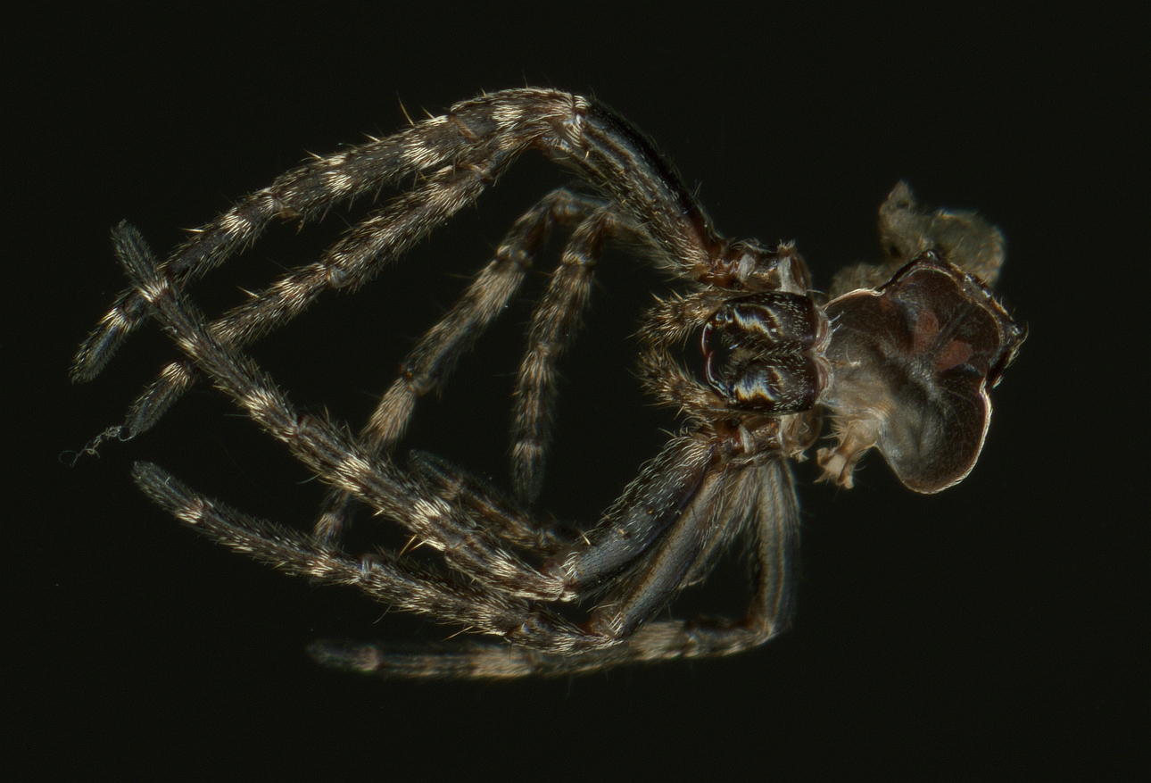 Die leere Haut einer kleinen Spinne, Grösse ungefaehr 1,3 cm.